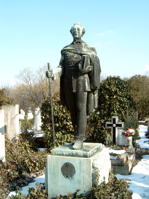 Gombocz Zoltán (Sopron, 1877. jún. 18. – Bp., 1935– máj. 1.): nyelvtudós, egyetemi tanár, az MTA tagja sírja Budapesten. Kerepesi temető: 34-1-88 [szobrász: Madarassy Walter].